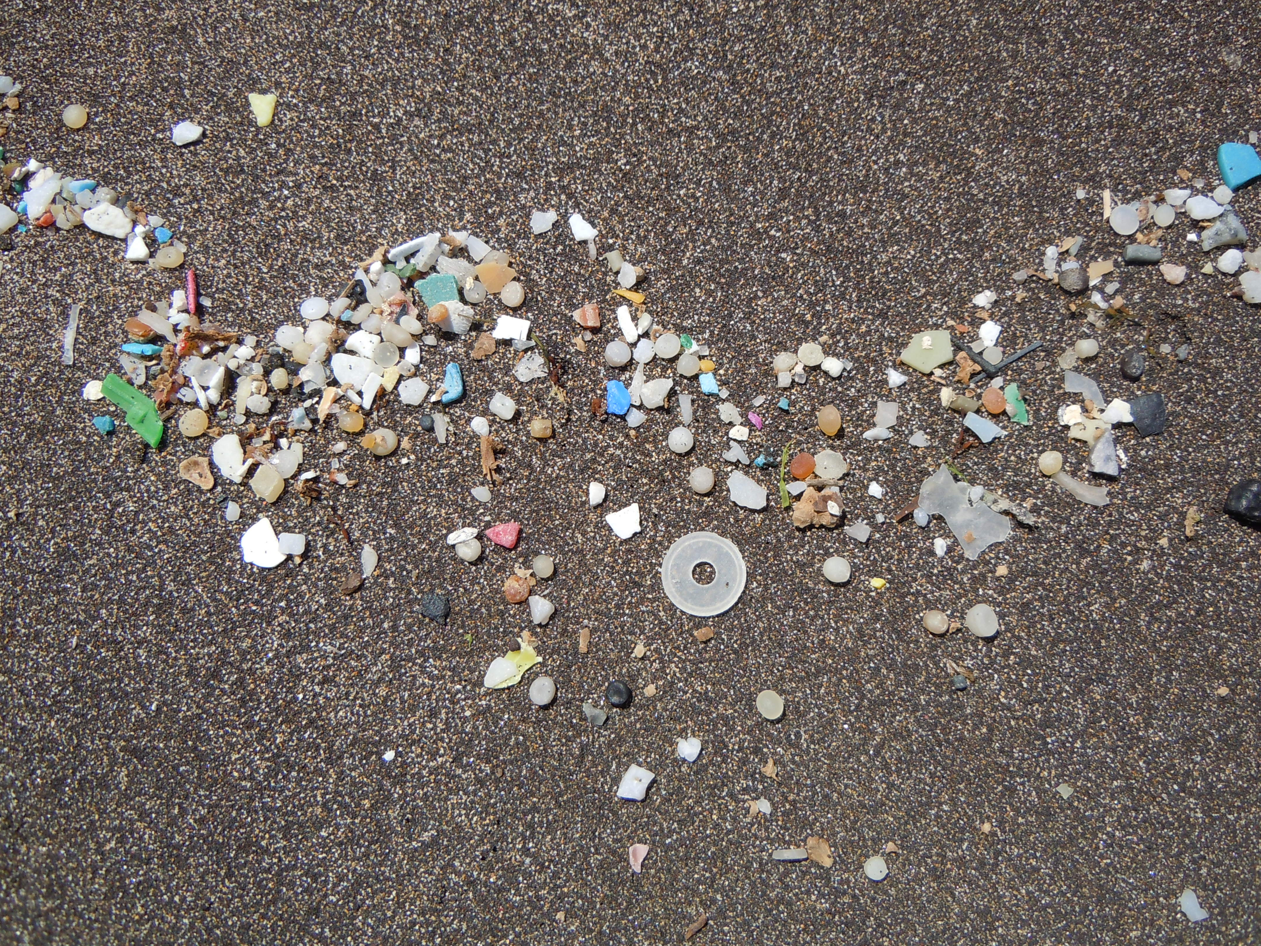 Débris plastiques, sur le sable de la plage de Famara, Lanzarote.